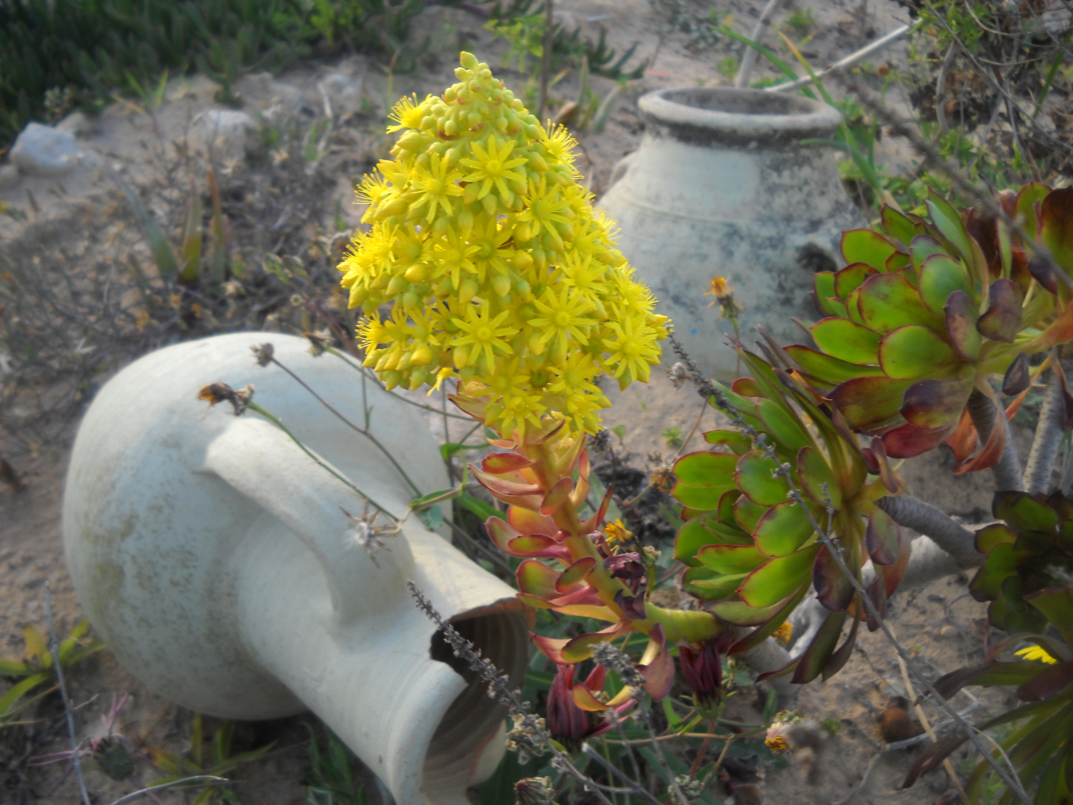 Fleur d'Aeonium arboreum, Prise au jardin à Djerba, cette plante n'appartient pas à la flore locale